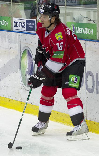 Нападающий новокузнецкого «Металлурга» Рэнди Робитайл во время матча чемпионата КХЛ против магнитогорского «Металлурга» 6 октября 2012 года